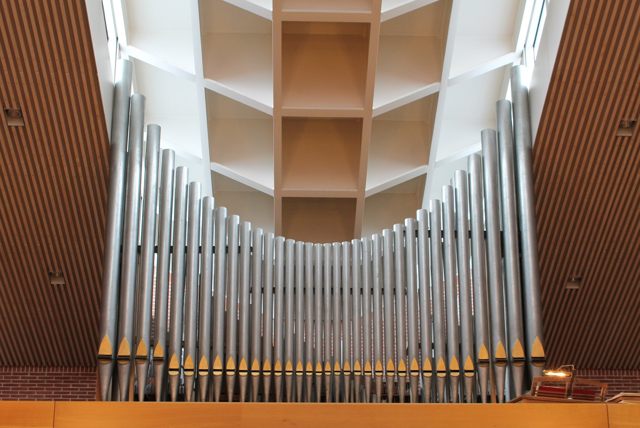 Orgel von St. Katharina von Siena in München (1957, J. Zeilhuber, II/28 als Chororgel der Münchner Frauenkirche. 1993 im Orgelmuseum Valley eingelagert. 1994 nach St. Katharina von Siena.)